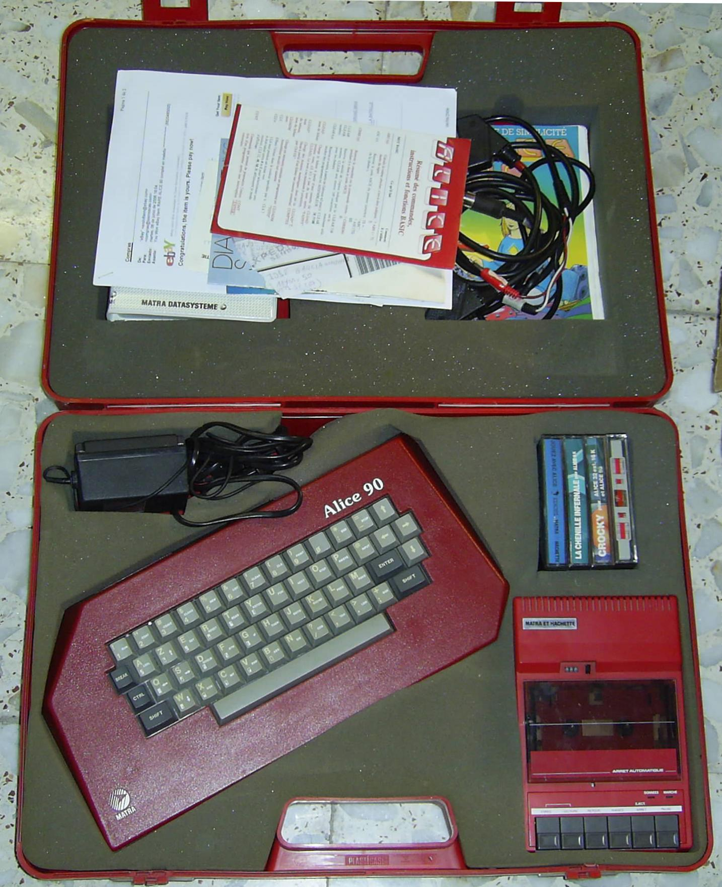 Ordenador Matra Alice 90 en su estuche con casete y manuales. El equipo de la imagen es parte de la colección de Juan Jose Garcia Gonzalez , el mayor coleccionista de España de RetroInformática